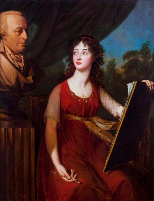 Мария Васильевна Васильчикова (1779-1844), жена В.П.Кочубея. Изображена рисующей бюст своего дяди - князя Александра Семёновича Васильчикова (1749-1813), фаворита Екатерины II.